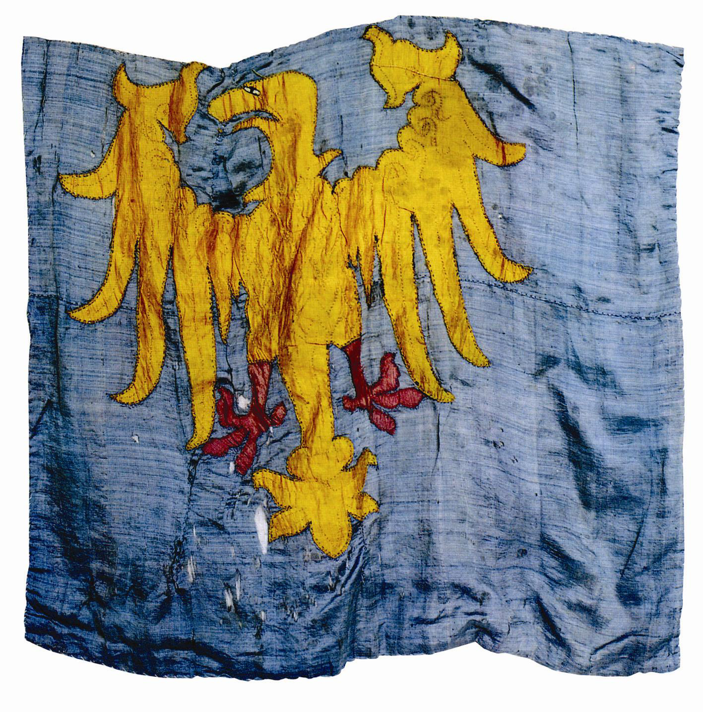 Antico vessillo patriarcale, facente parte delle vesti del Beato Patriarca Bertrando (1258 - 1350), che mostra l'aquila araldica divenuta poi simbolo del Friuli.